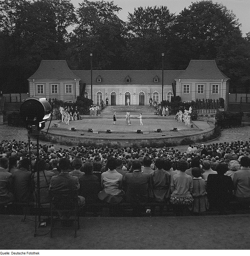 Original image description from the Deutsche Fotothek Dresden. Großer Garten, Freilichtbühne Junge Garde, Aufführung von Schwanensee?